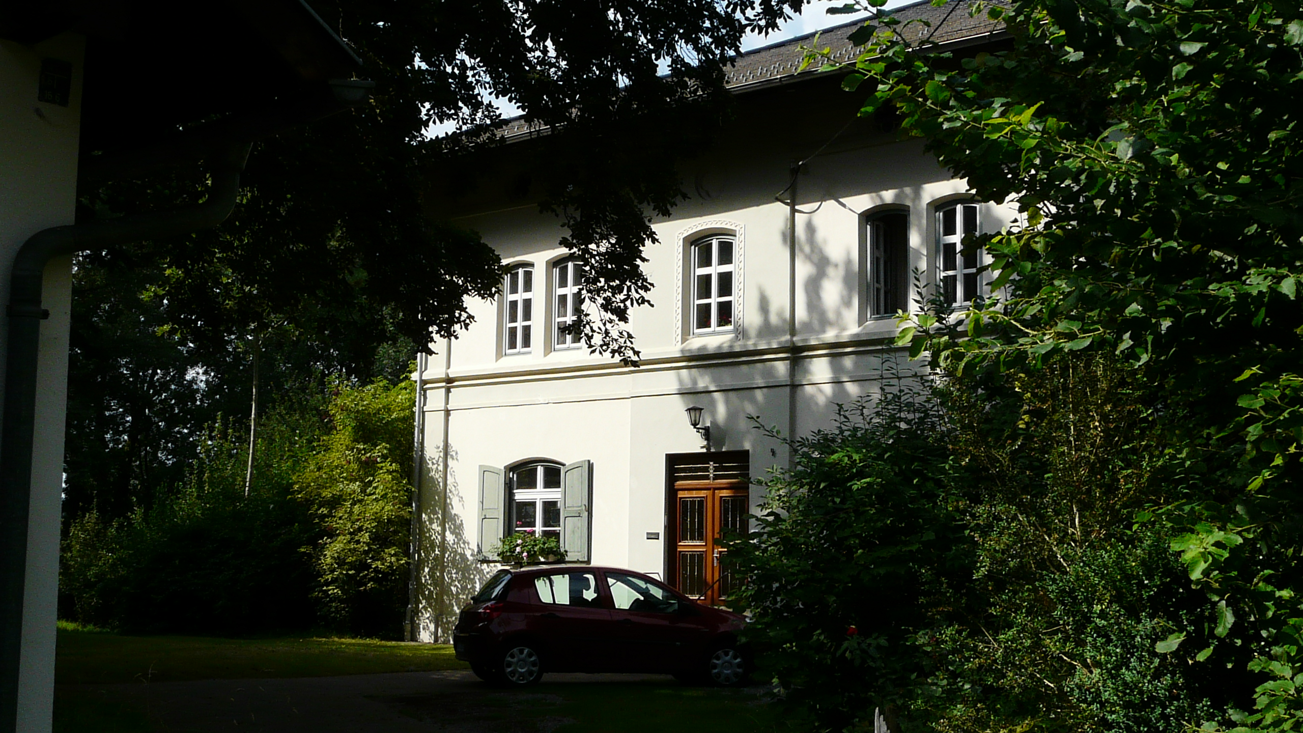 Pfarrhof in Aufkirch, Markt Kaltental